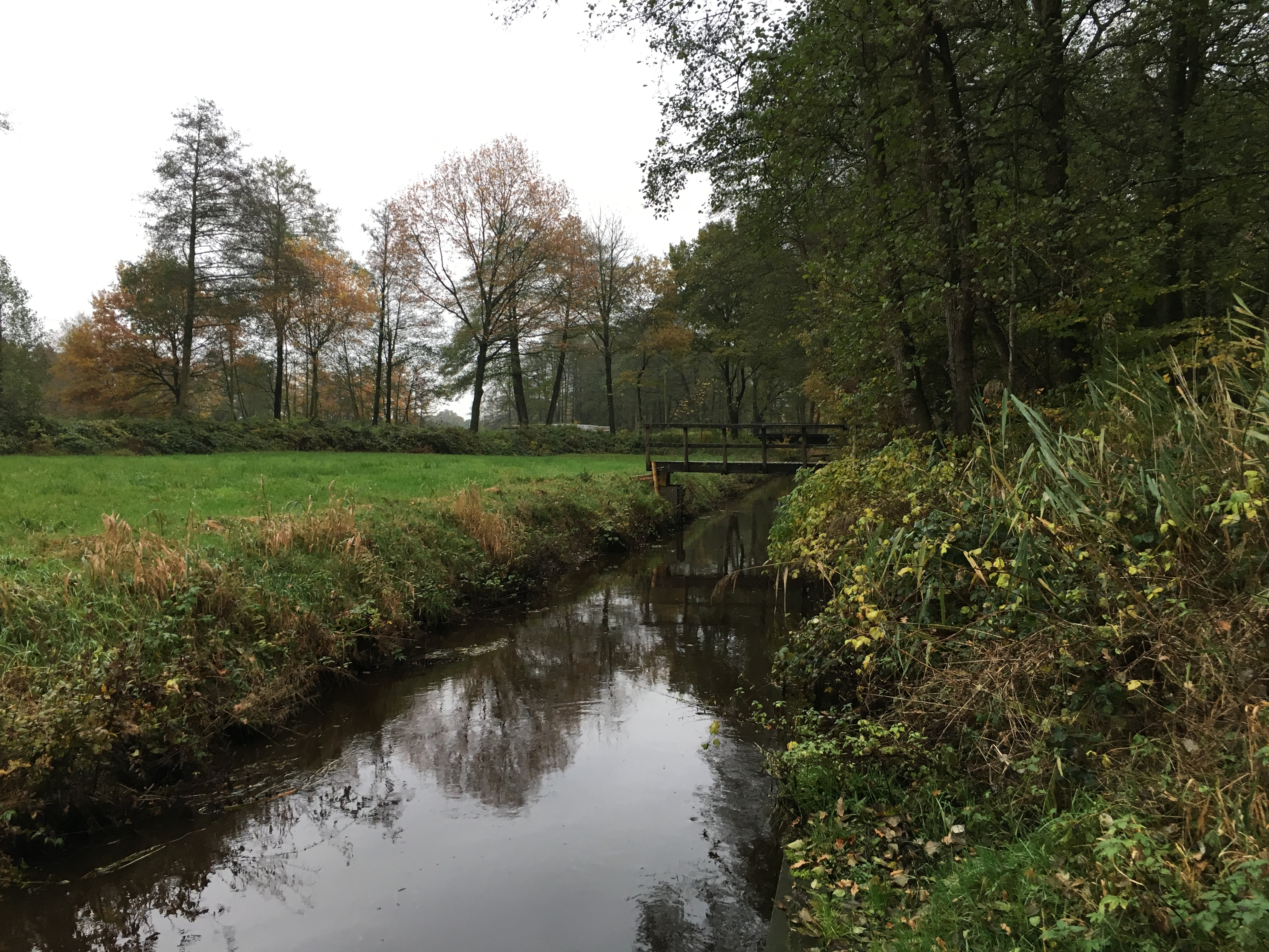 Meh in Breedmeh, Alfst